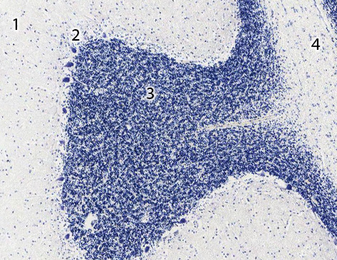 Histological image of dog cerebellum with numbers for cell layers.